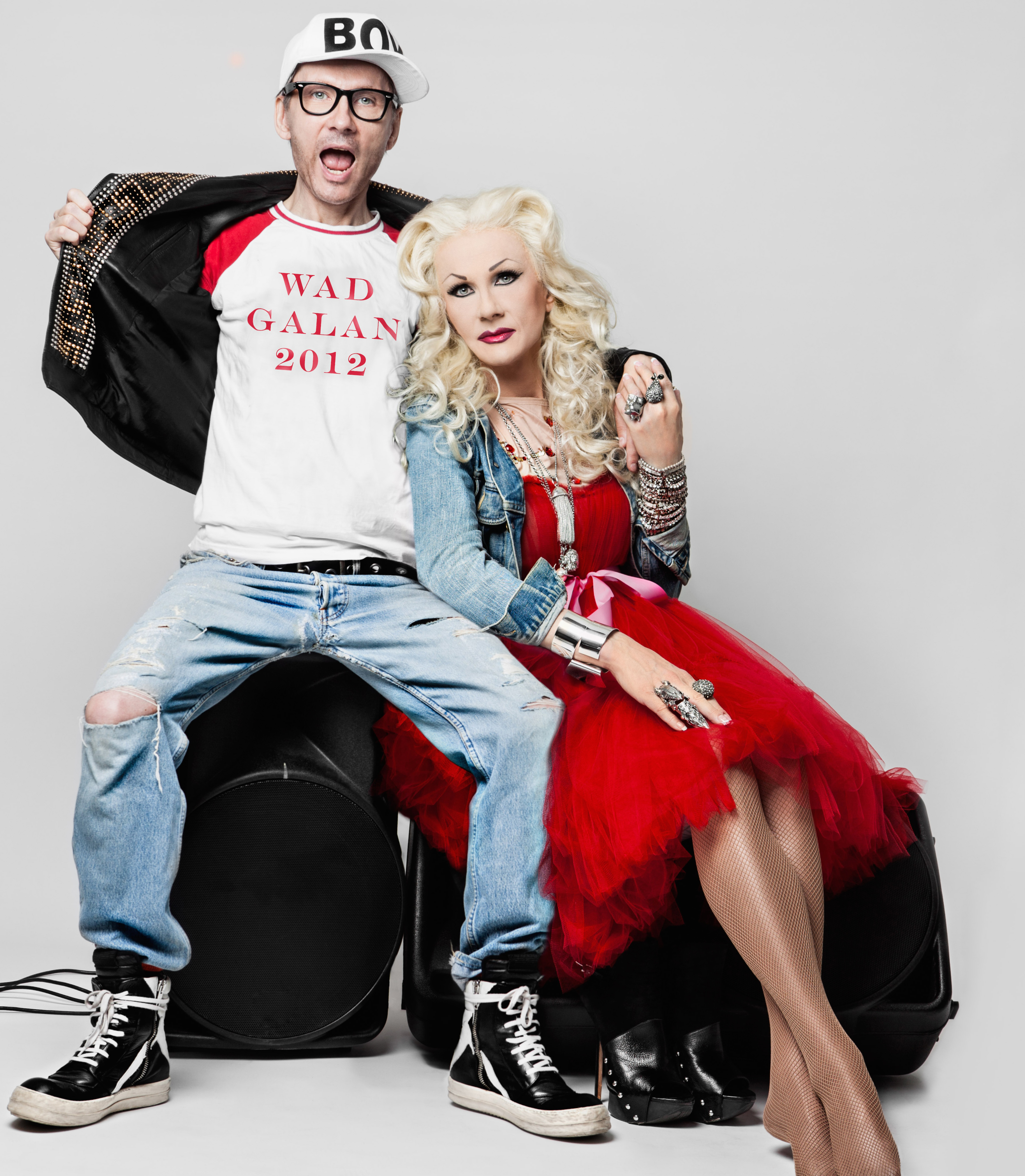 World Aids Day Galan